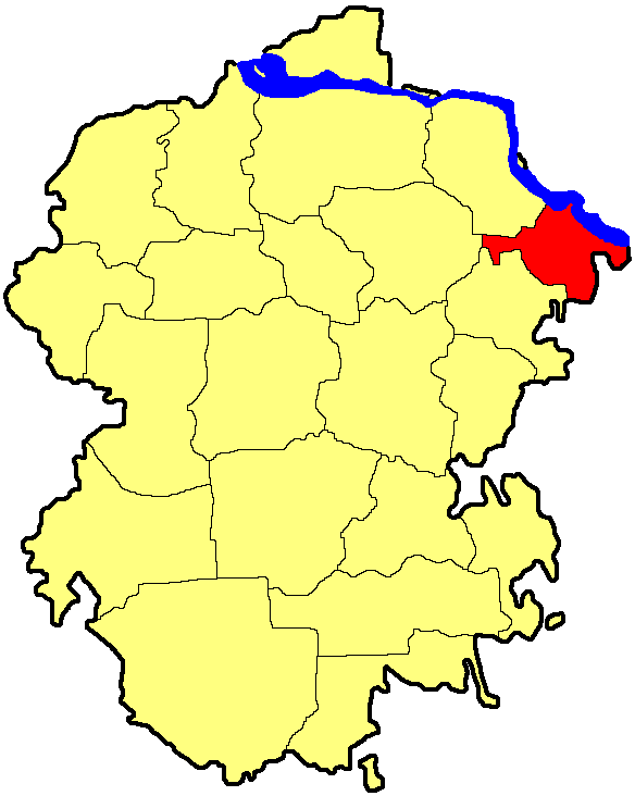 Козловський район Чувашії